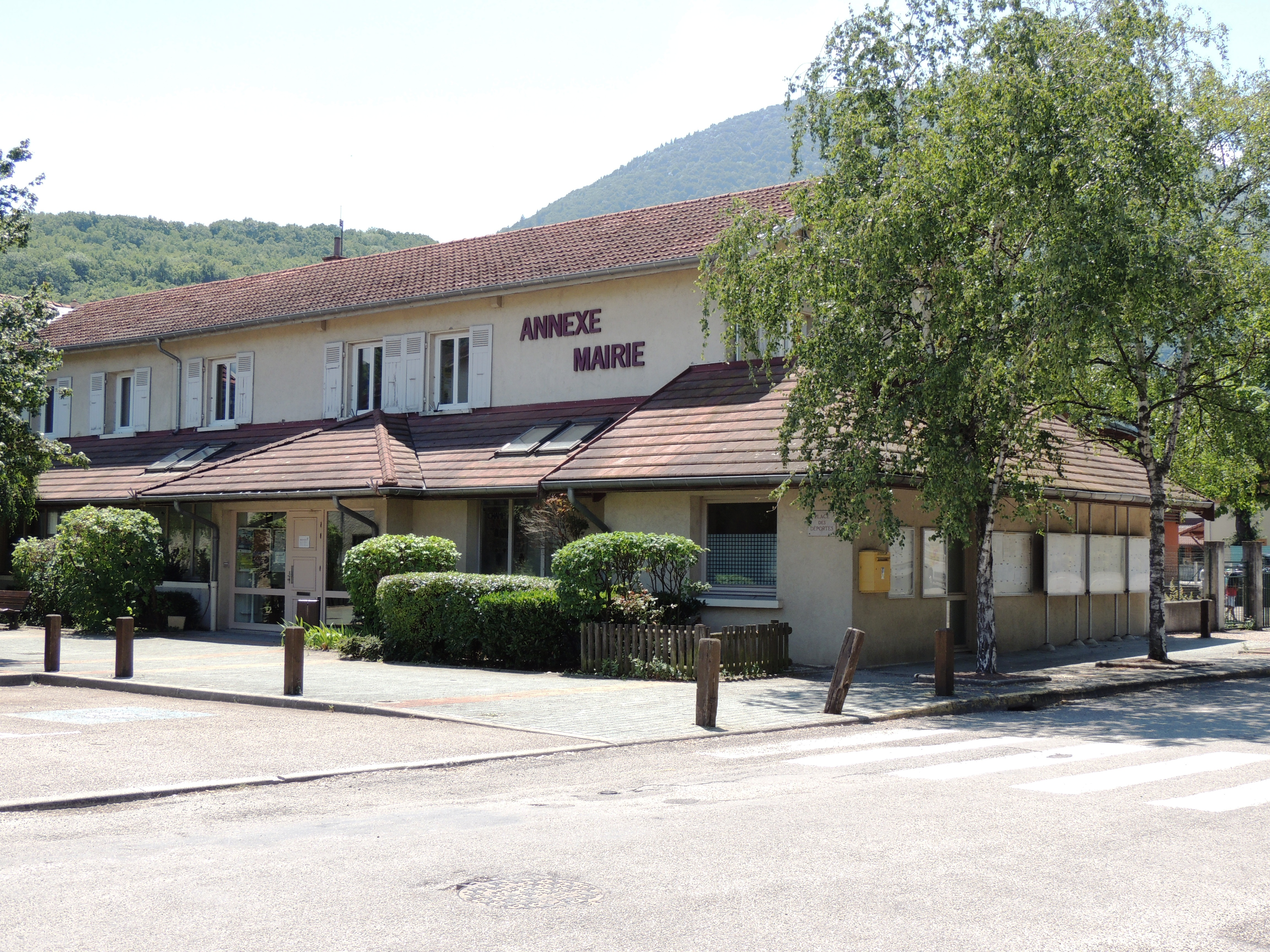 Mairie de Champ-sur-Drac.